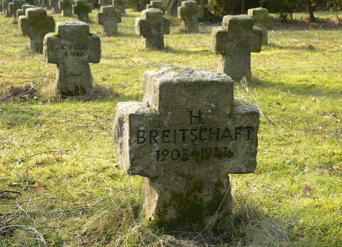 Grabstein für Hubert Breitschaft